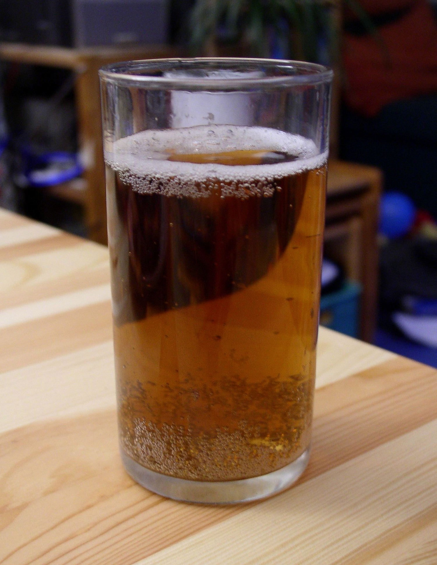 Fassbrause